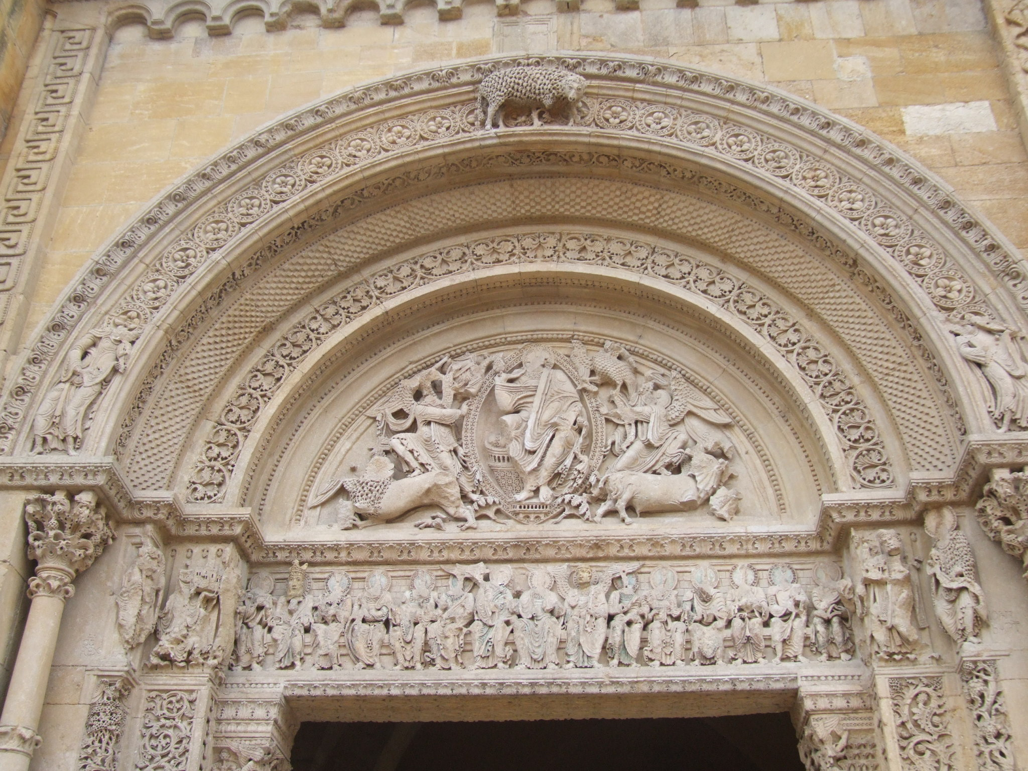 grand portail nord de l'église Saint Fotuné de Charlieu